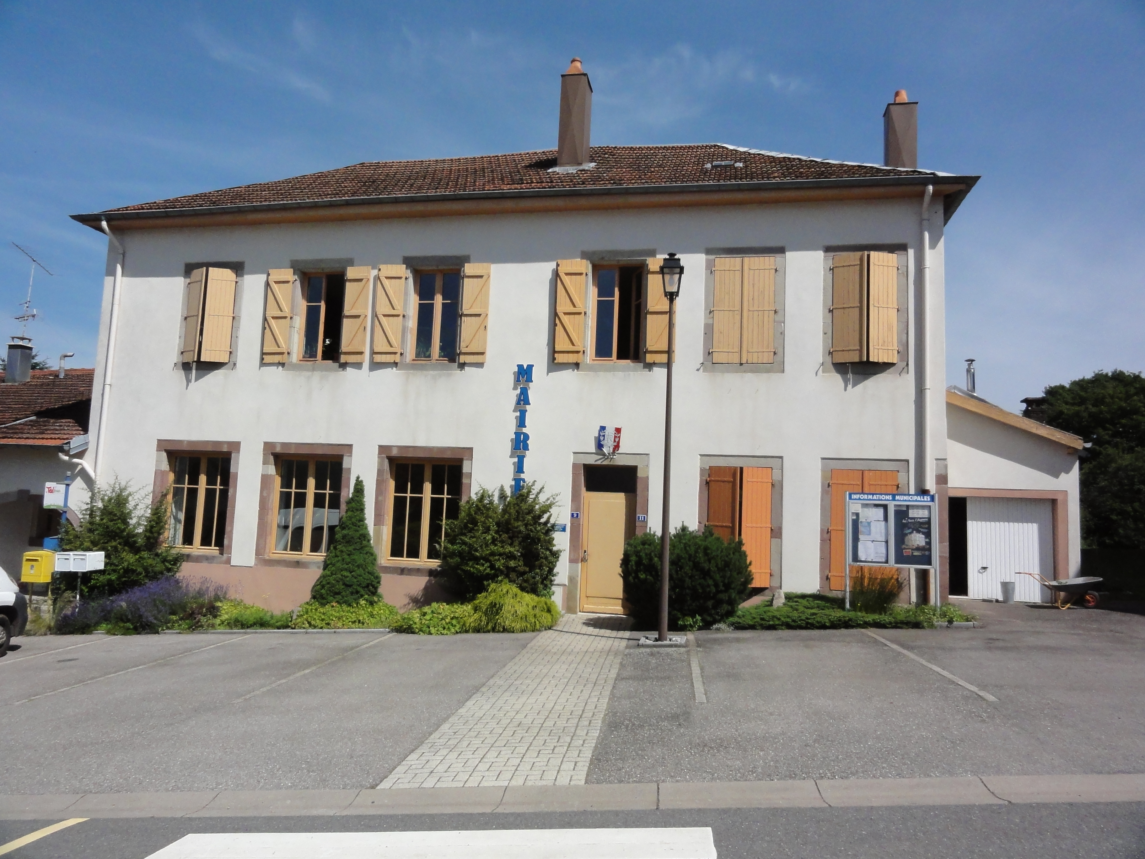 Angomont (M-et-M) mairie